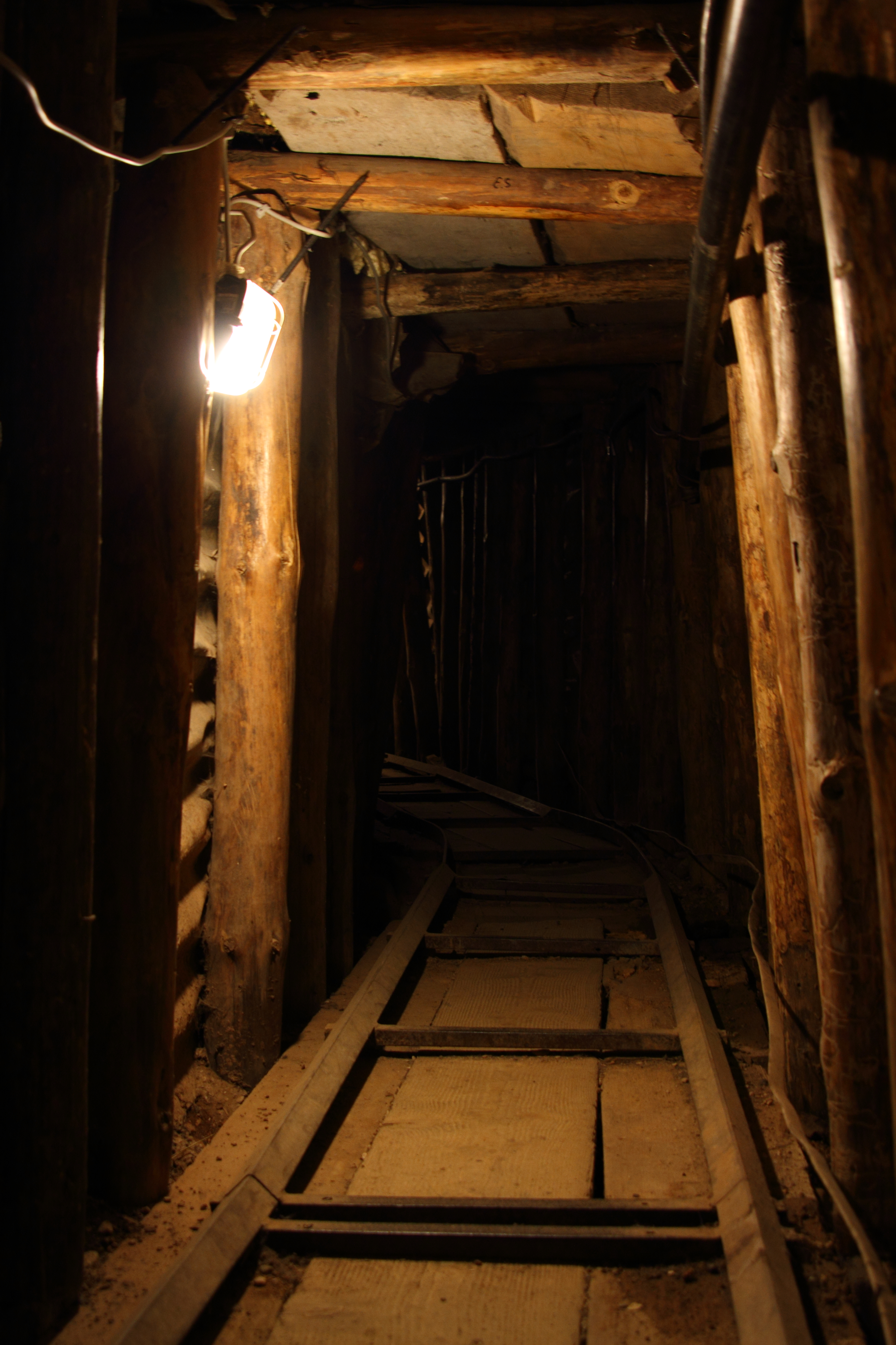 Sarajevo-Tunnel